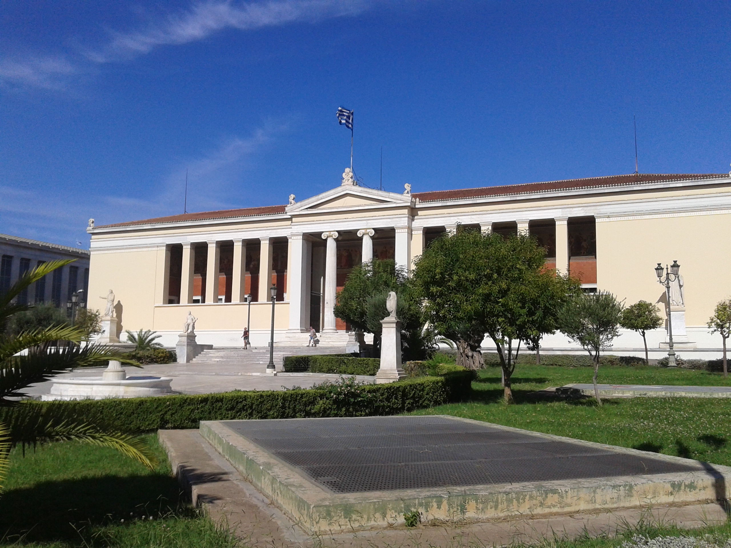 Εθνικό και Καποδιστριακό Πανεπιστήμιο Αθηνών«Κτίριο Εθνικού και Καποδιστριακού Πανεπιστημίου Αθηνών»